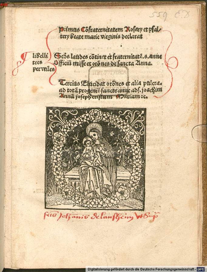 Buchtitelblatt des geistlichen Schriftstellers Johannes von Lambsheim, Augustiner-Chorherr im Kloster Kirschgarten, Worms, 1485